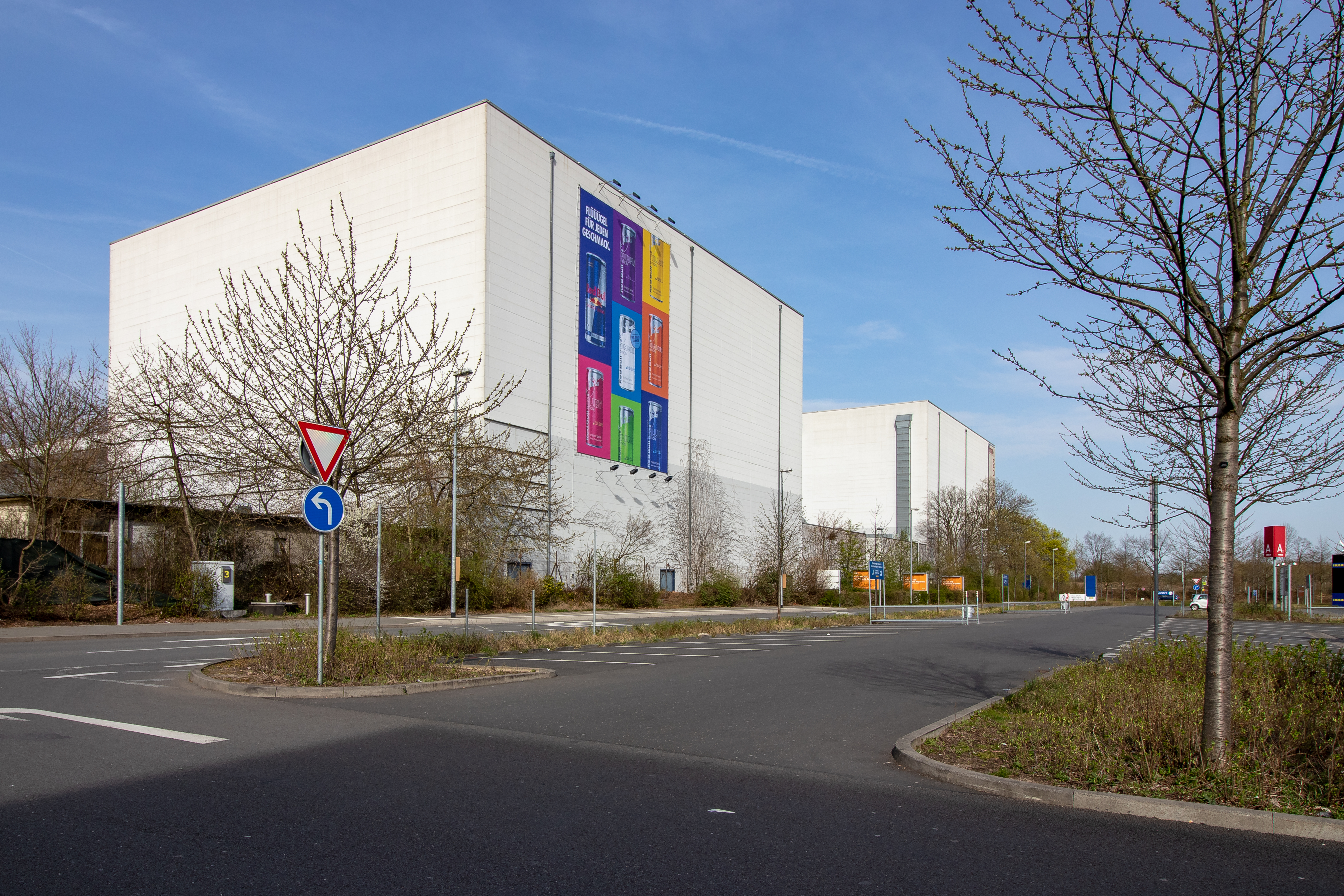 Studiokomplex Coloneum der Magic Media Company in Köln-Ossendorf